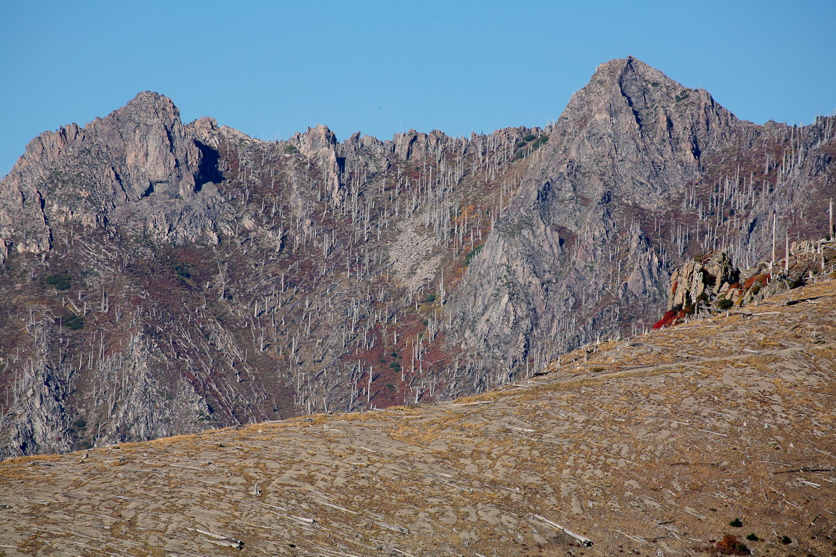 067 IMG_2571_resize